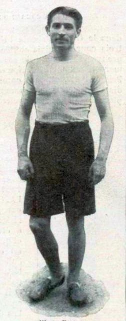 Henri Tauzin en 1898 (champion de France du 400 mètres haies)..